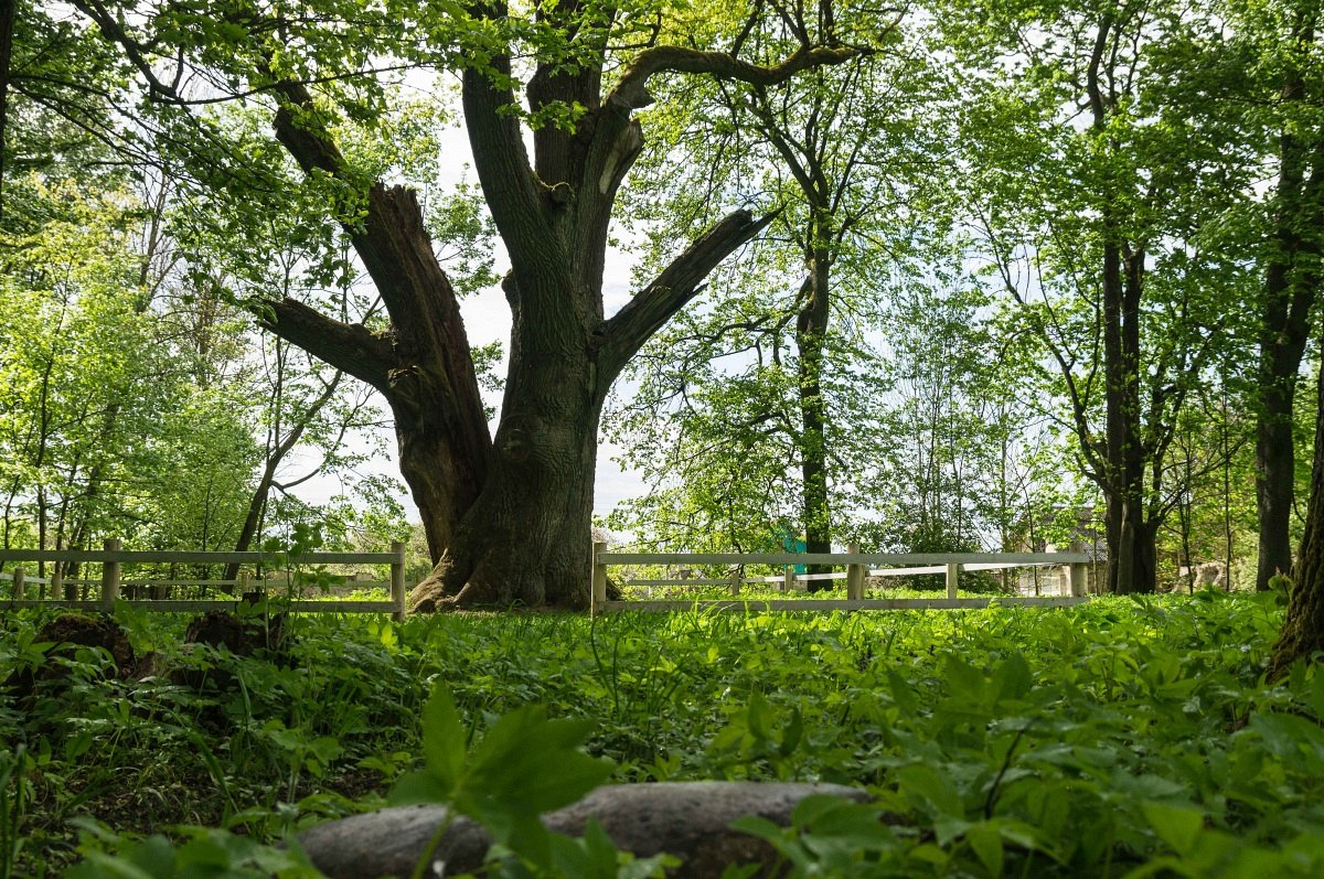 Сітцы. Сядзіба Дамейкаў